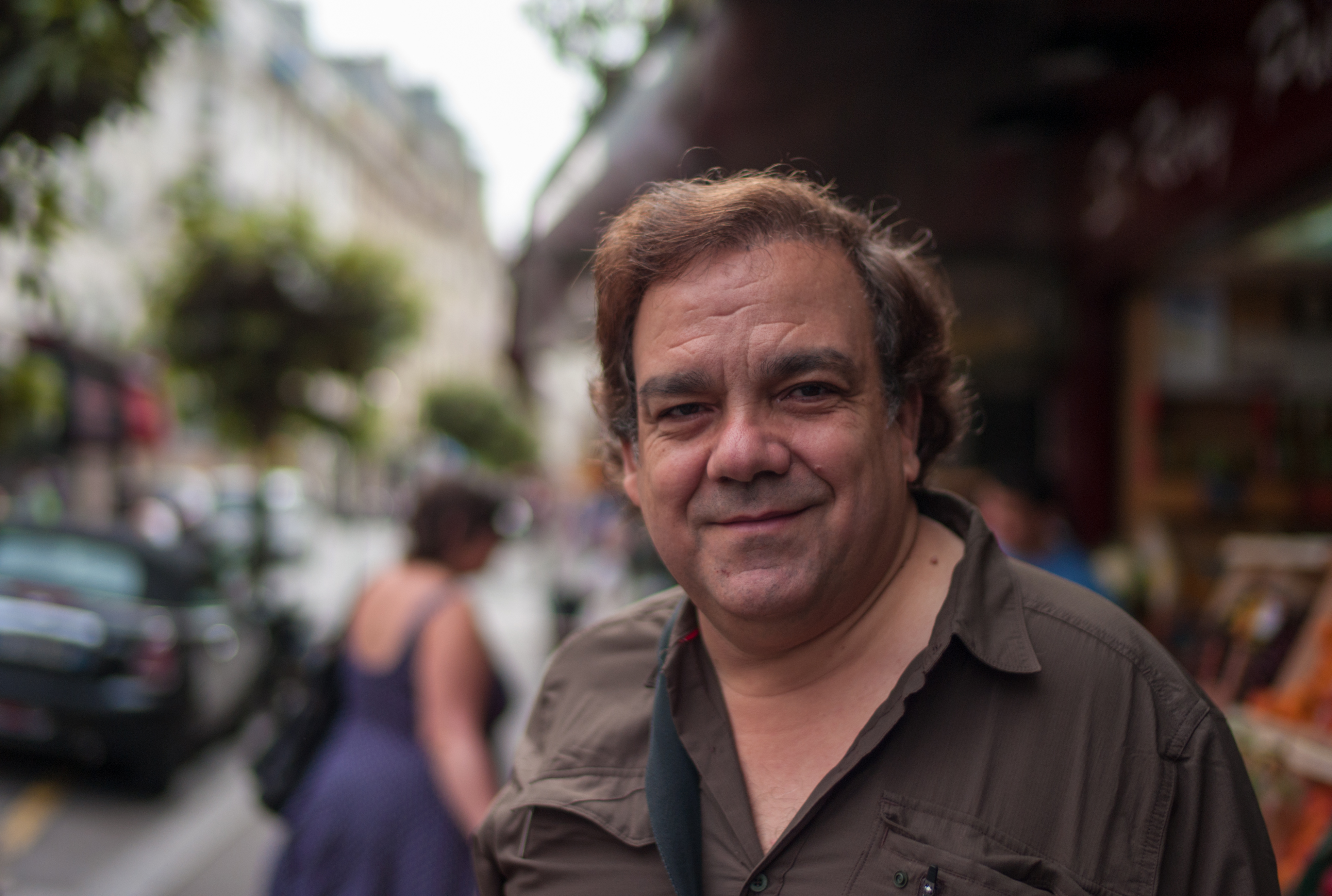 Didier Bourdon à Paris, fin juillet 2013